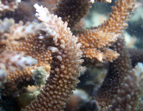 Acropora acuminata, Samoa Americana